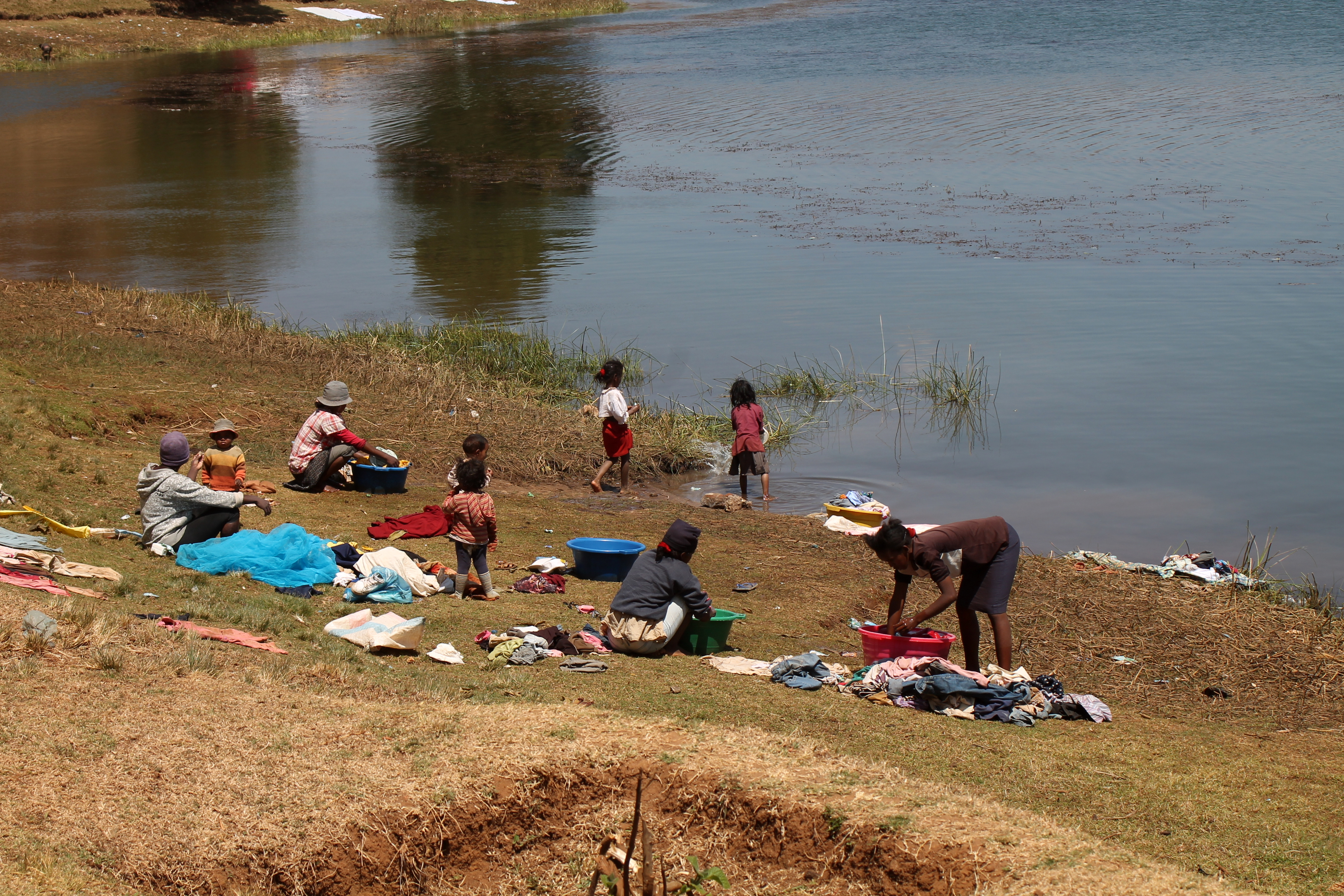 Andraikibameer